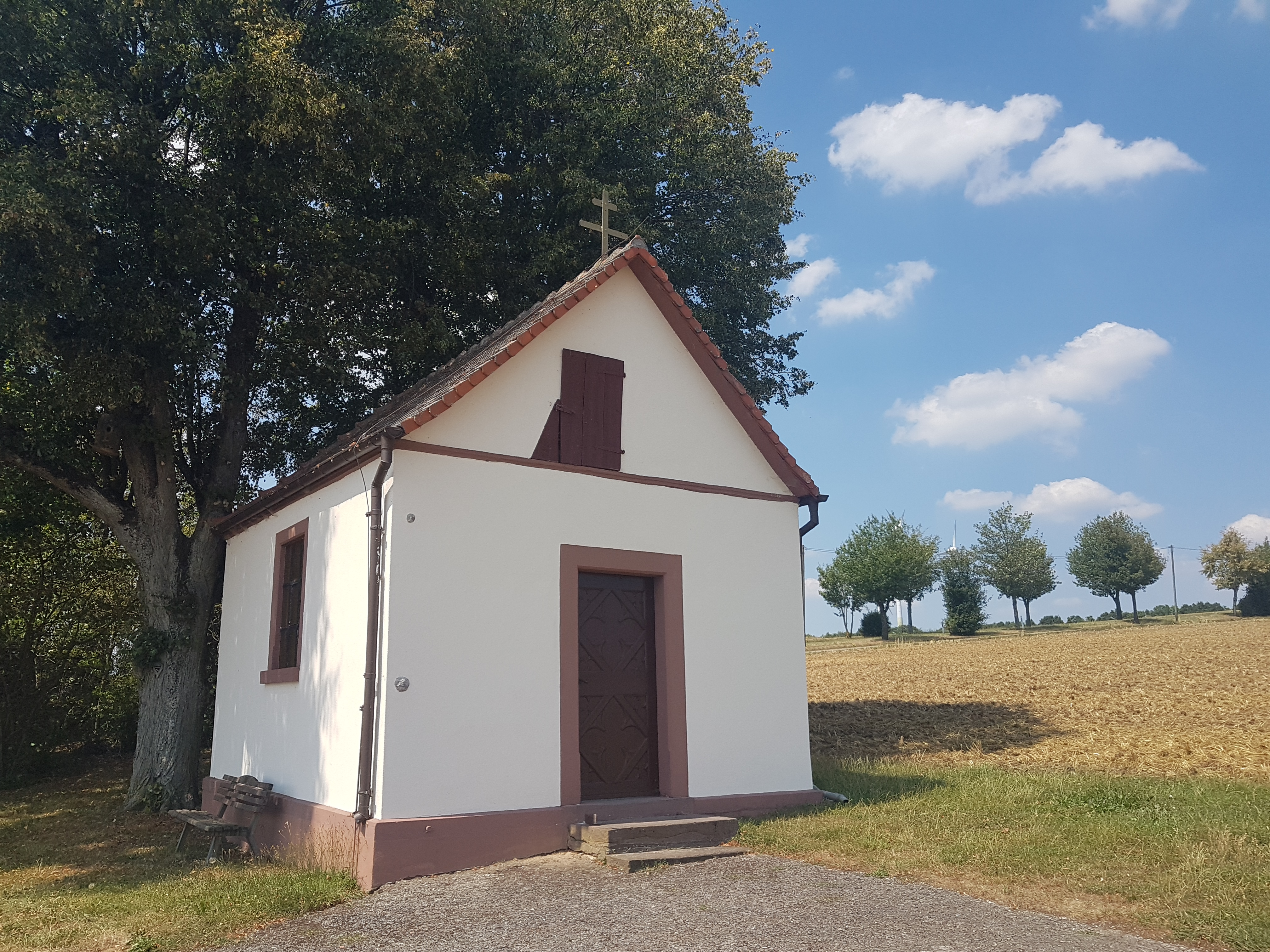 Wegkapelle an der Straße von Pülfringen in Richtung Schweinberg